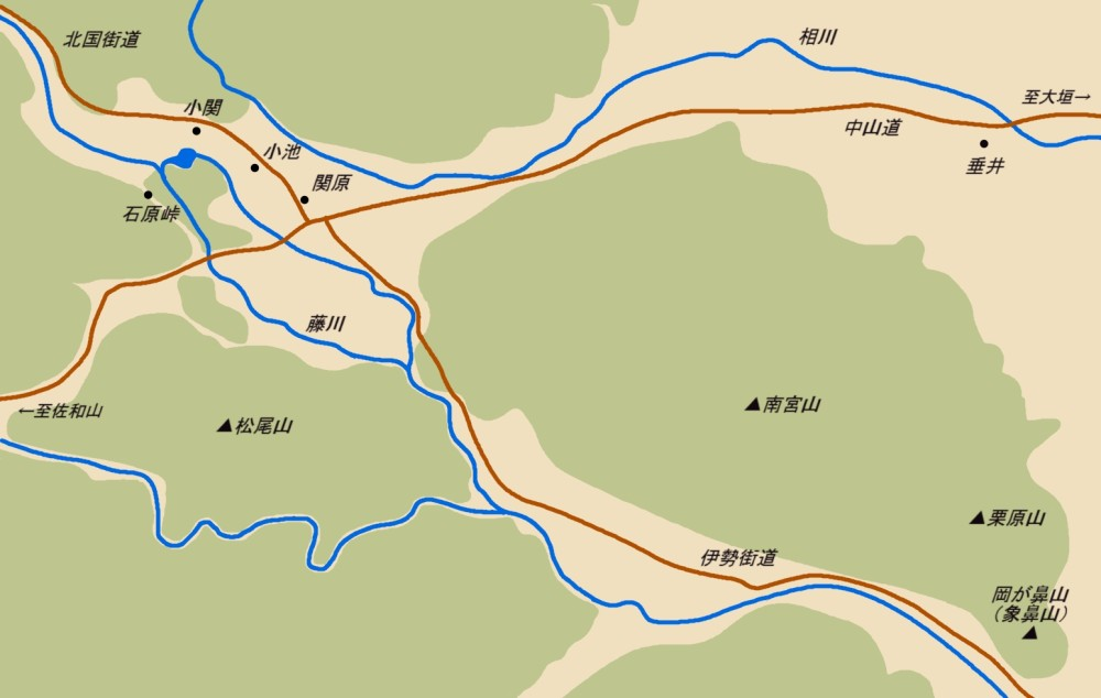 関ヶ原周辺地図